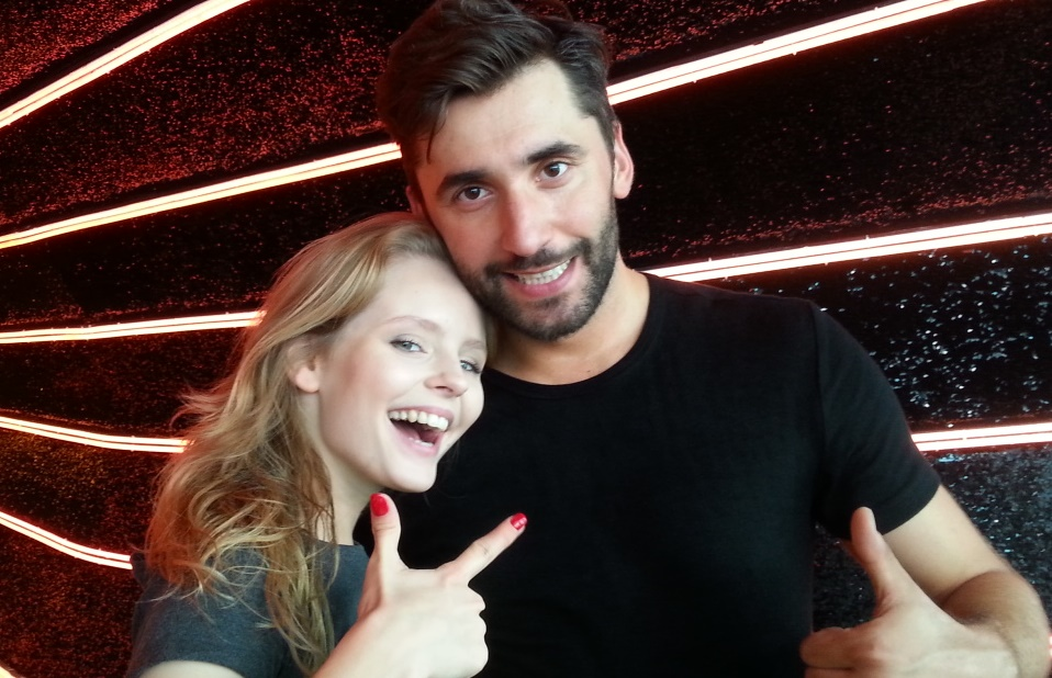 Polska aktorka Olga Kalicka i tancerz Rafał Maserak na planie 6. edycji programu "Dancing with the Stars. Taniec z gwiazdami" we wrześniu 2016 roku.